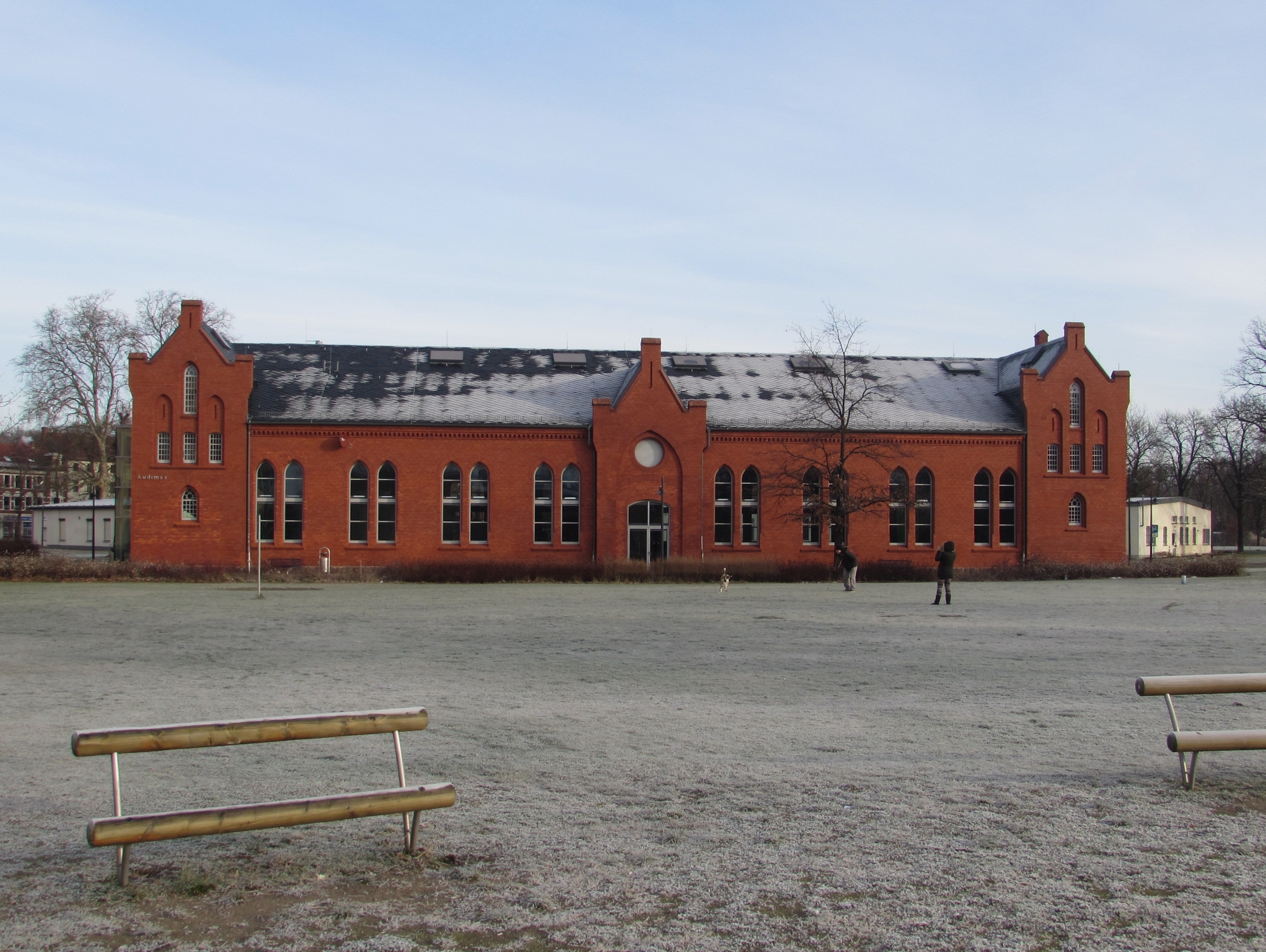 fh brandenburg auditorium maximum